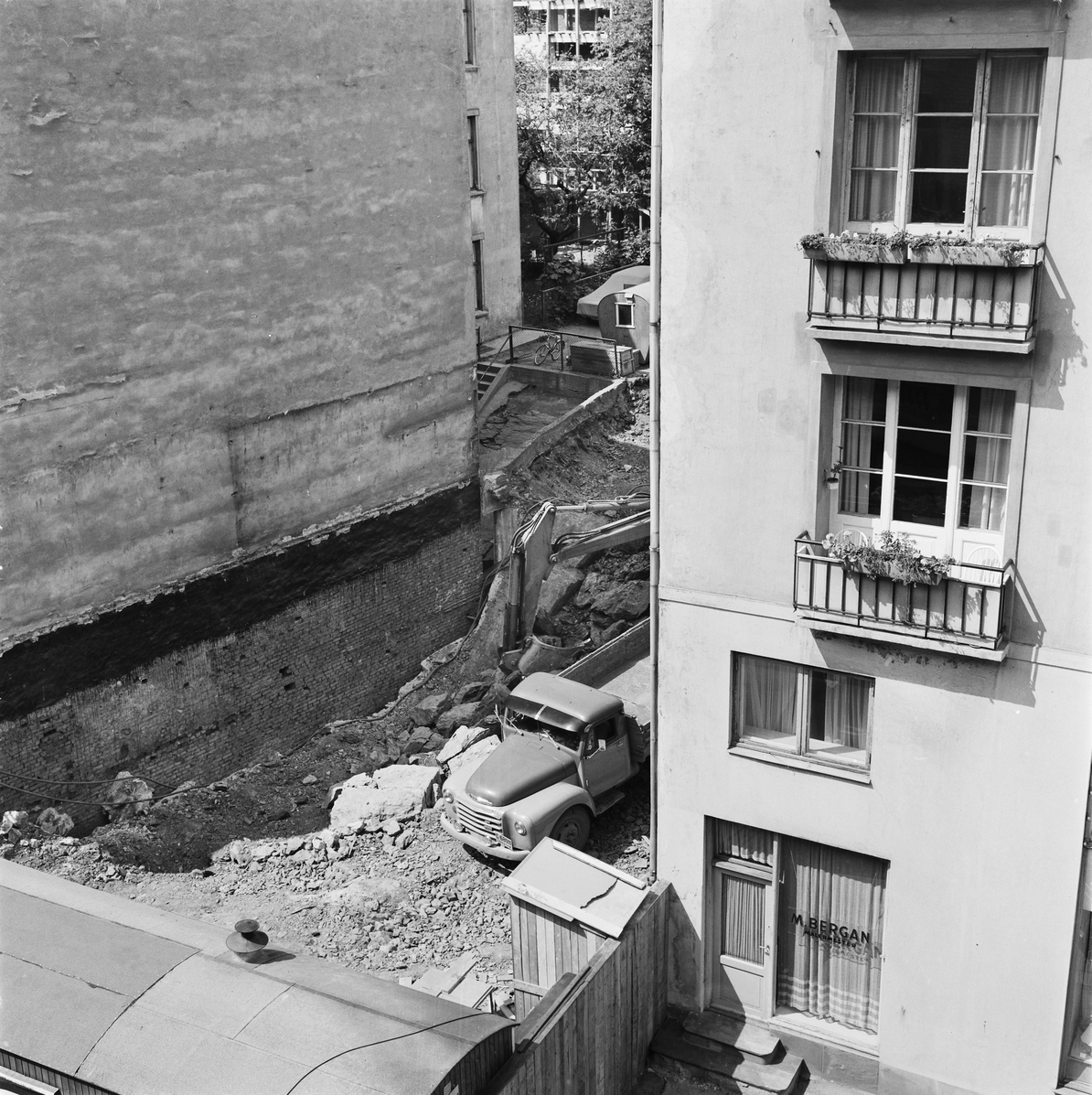 Niels Juels gate 68 er revet, mens nr. 66 (t.v.) og 70 står. Foto: Leif Ørnelund, 15/6-1965. Fra Oslo Museums samling.